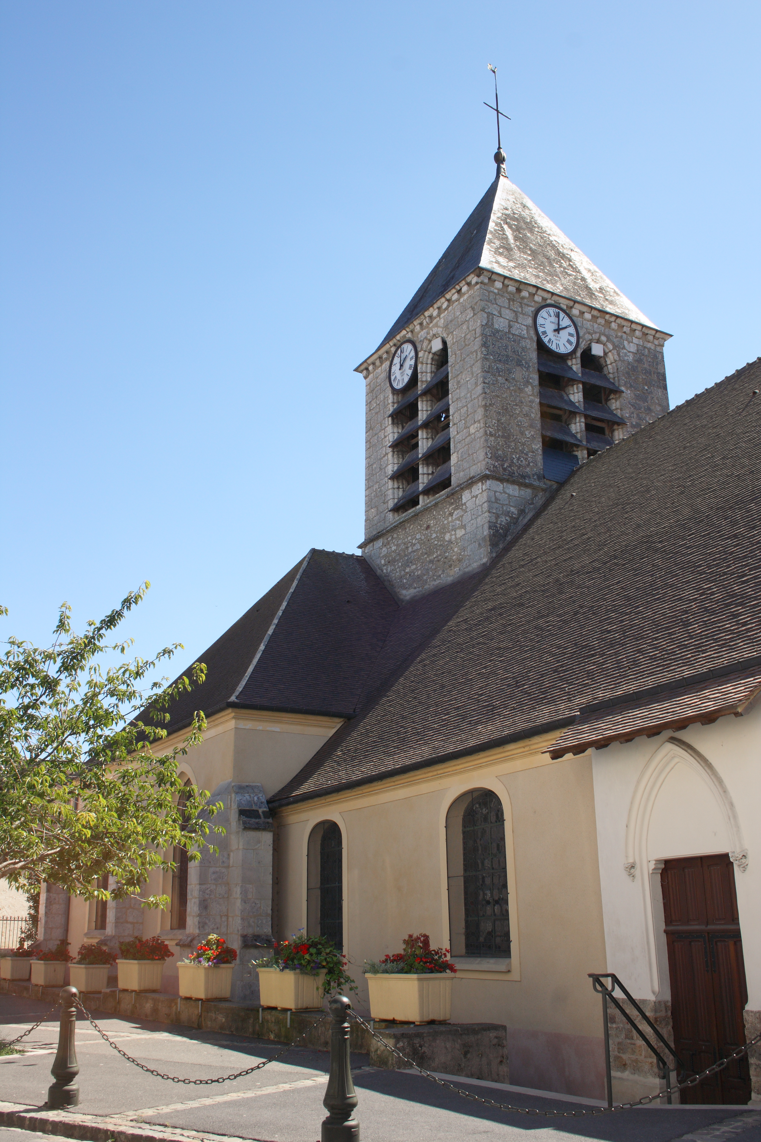 Kirche Saint-Romain in La Ferté-Gaucher im Département Seine-et-Marne (Île-de-France)